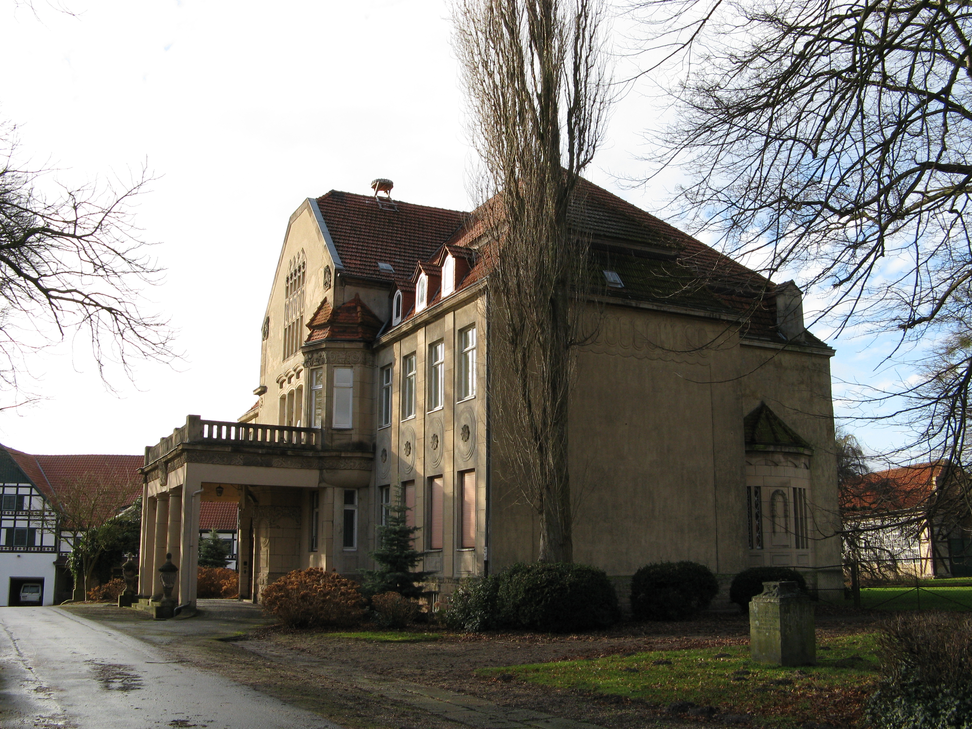 Rittergut Eisbergen (Haupthaus mit Orangerie rechts)